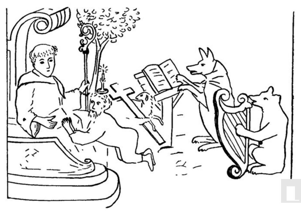 Steinbild in der ehemaligen Alpirsbacher Klosterkirche, Bleistiftzeichnung als Beilage zu einem Spottgedicht von Simon Studion.